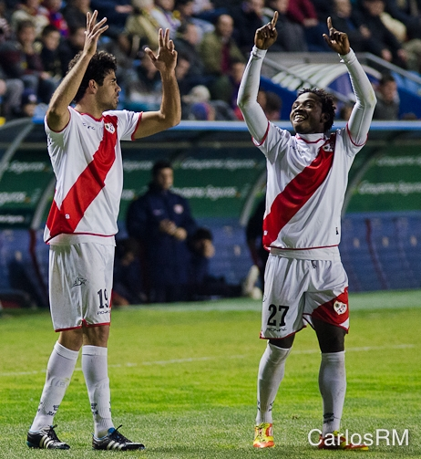 Levante - Rayo (D.Costa, Lass)